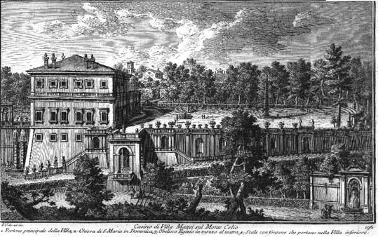 Garten der Villa Celimontana in Rom